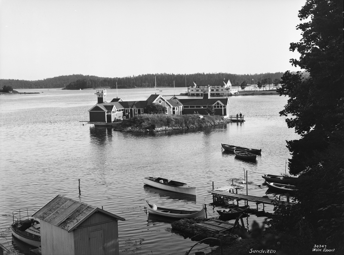 Sandviken sjøbad på øya Danmark utenfor Sandvika. Oppført 1923, revet 1972. Foto: Anders Beer Wilse, 1927. Fra Byhistorisk samling hos Oslo Museum.